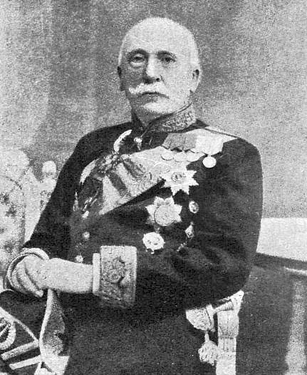 Шлиппе, Владимир Карлович (1834—1923)